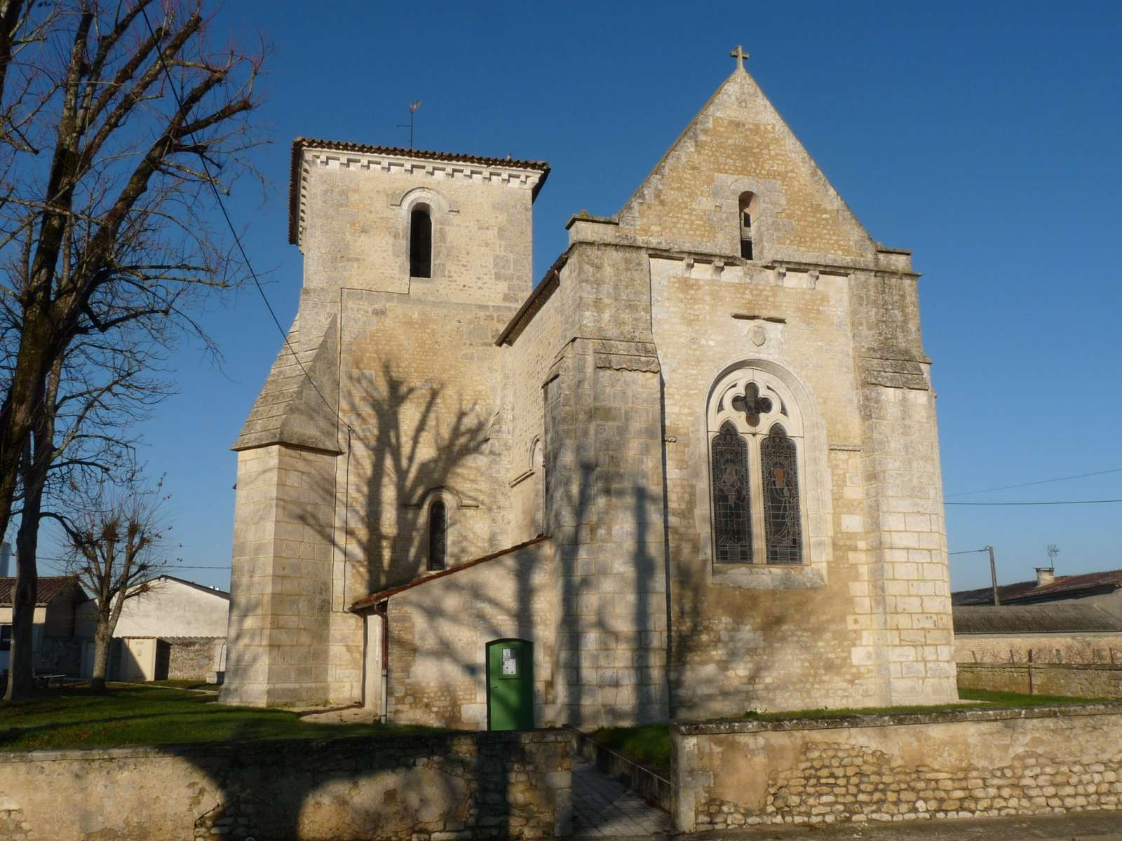 église d'Angeac-Champagne, Charente, France